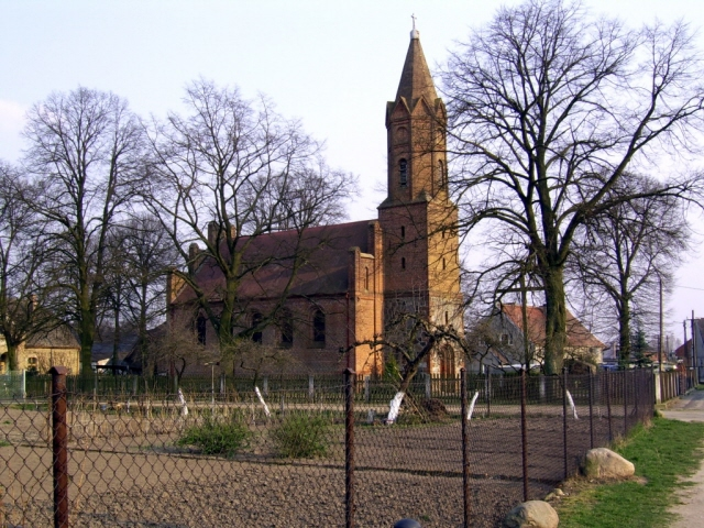 Bobrówko - dawny kościół ewangelicki, obecnie rzymskokatolicki parafialny p.w. św. Antoniego z Padwy, 1870